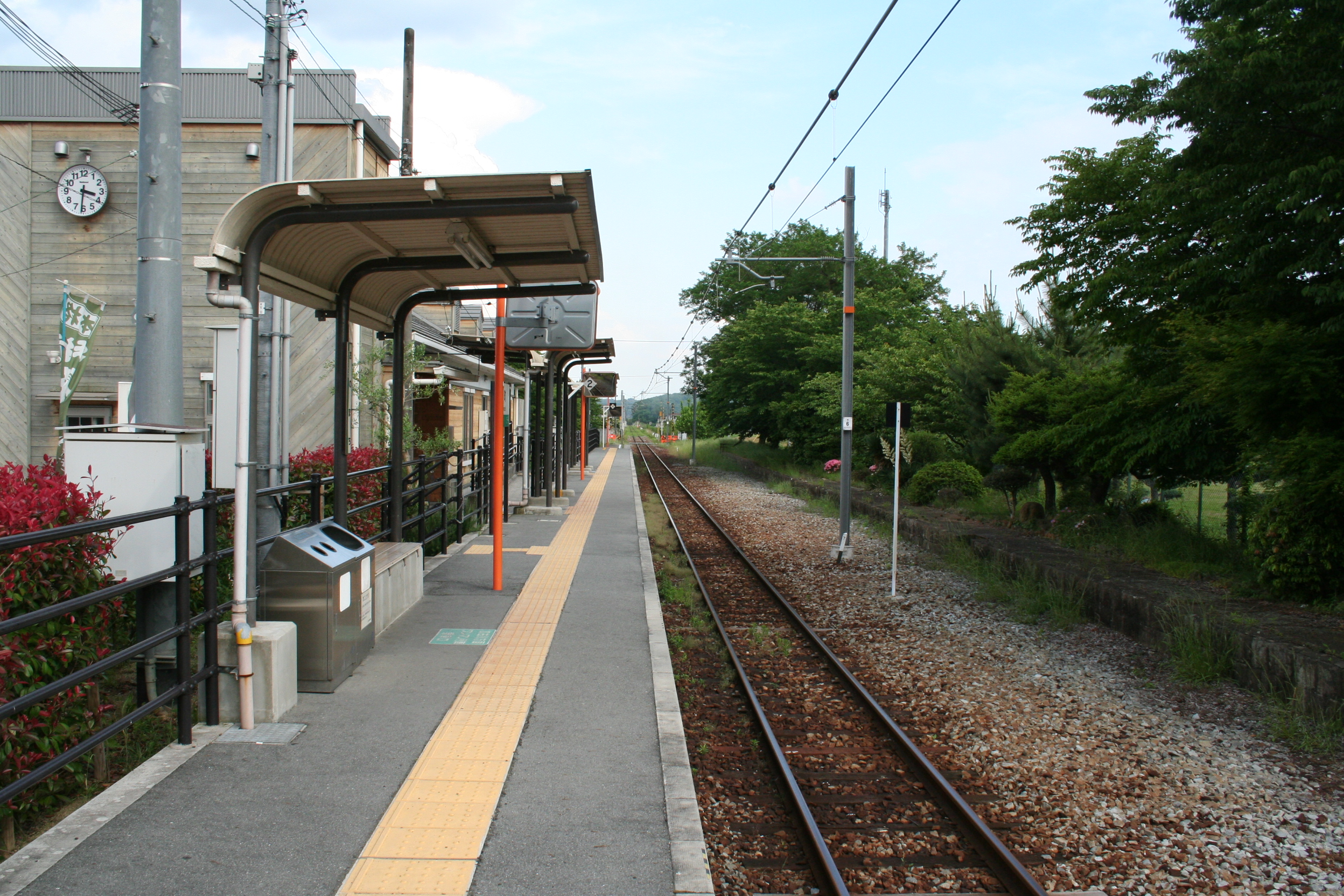 兵庫県小野市にあるJR西日本の鉄道駅の一つ、小野町駅。 ホームの西側から見た駅のホーム。